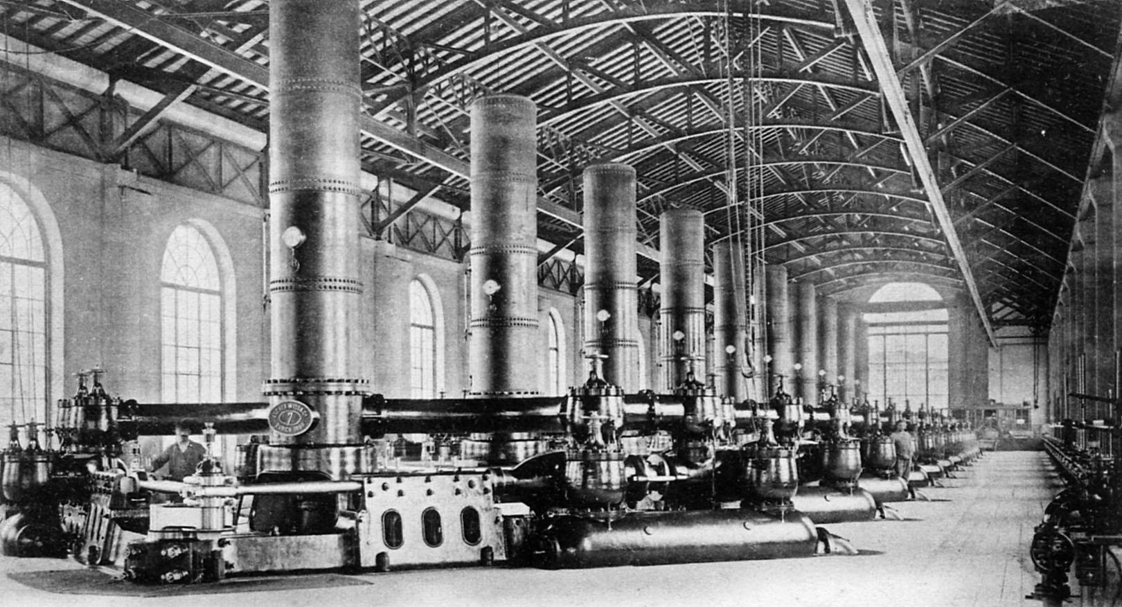 Genève - Forces Motrices. Vue intérieure de la salle des machines avec les pompes.